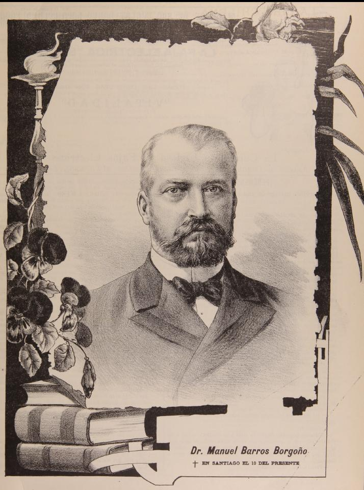 Manuel Barros Borgoño (Santiago de Chile, 11 de julio de 1852 - íbidem, 11 de marzo de 1903).1 Catedrático y decano chileno de Medicina y Farmacia. Rector de la Universidad de Chile entre 1901 a 1903.